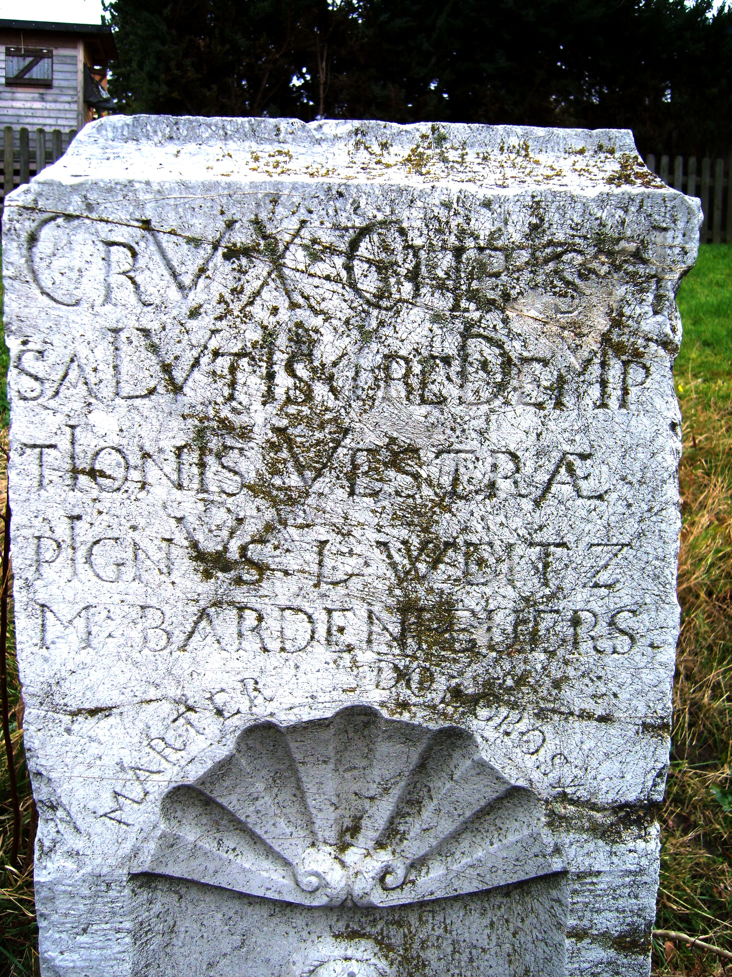 Chronogramm in Eschweiler in der Städteregion Aachen